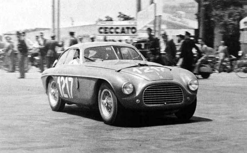 1950 Ferrari 166 MM Berlinetta by Carrozzeria Touring, at the Coppa della Toscana (June 4, 1950). The driver is Cornacchia and Del Carlo, and it was entered in that race as a Ferrari 195 S because it had a 195 engine.[1] This is however, a 166 MM, chassis number #0026M.[2] It also won the Mille Miglia (April 23, 1950) with Giannino Marzotto and Marco Crosara.[3]